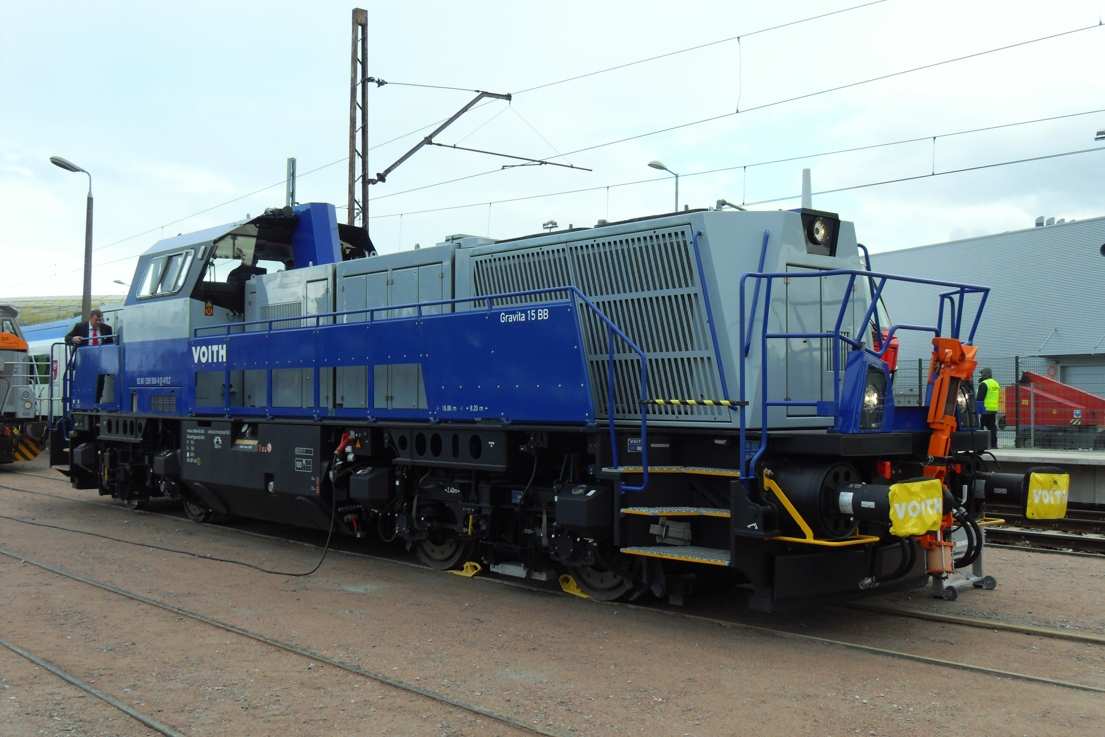 Gdańsk Letnica. TRAKO 2013, lokomotywa Voith Gravita 15 BB.